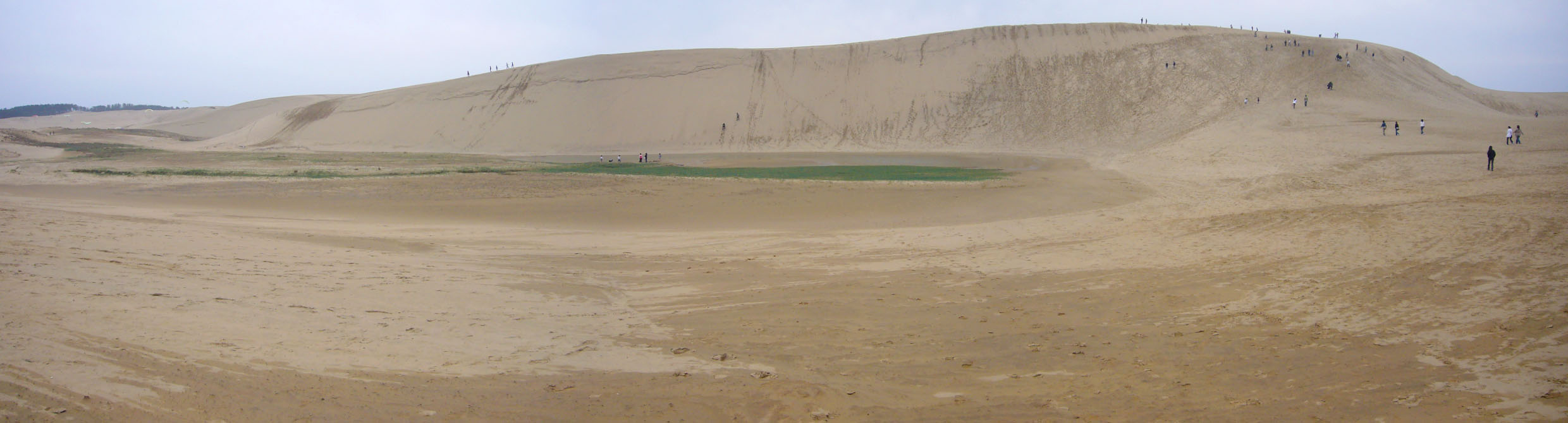 Tottori Sand Dune in Tottori, Tottori prefecture, Japan